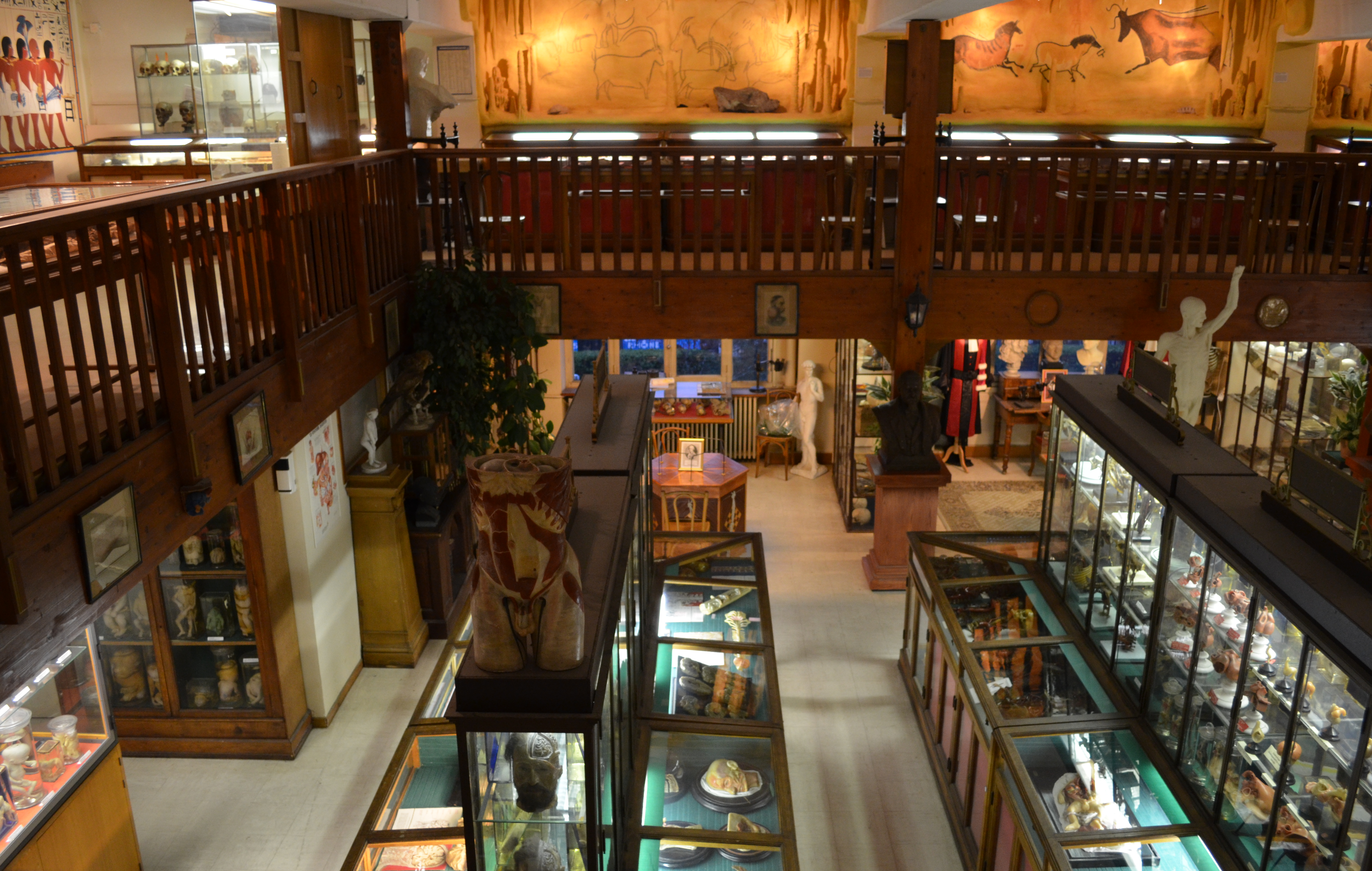 Intérieur du musée Testut-Latarjet, Lyon.